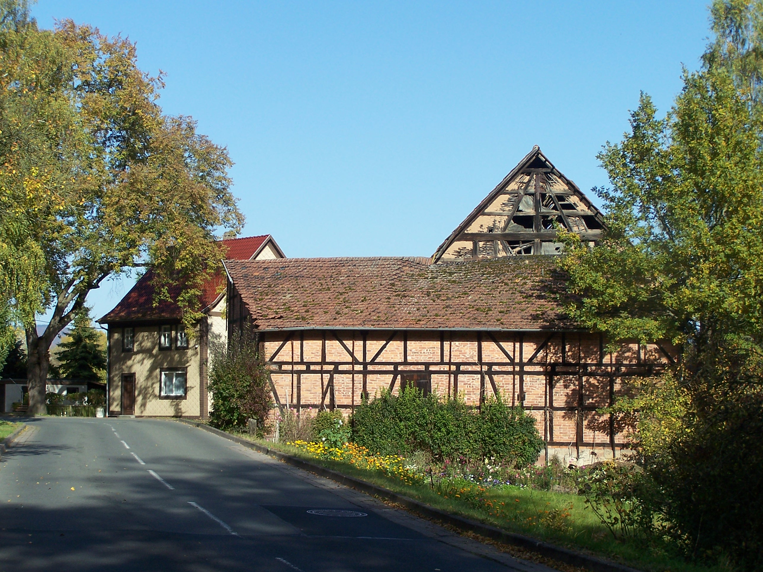 Hauenhof, ein OT von Barchfeld-Immelborn